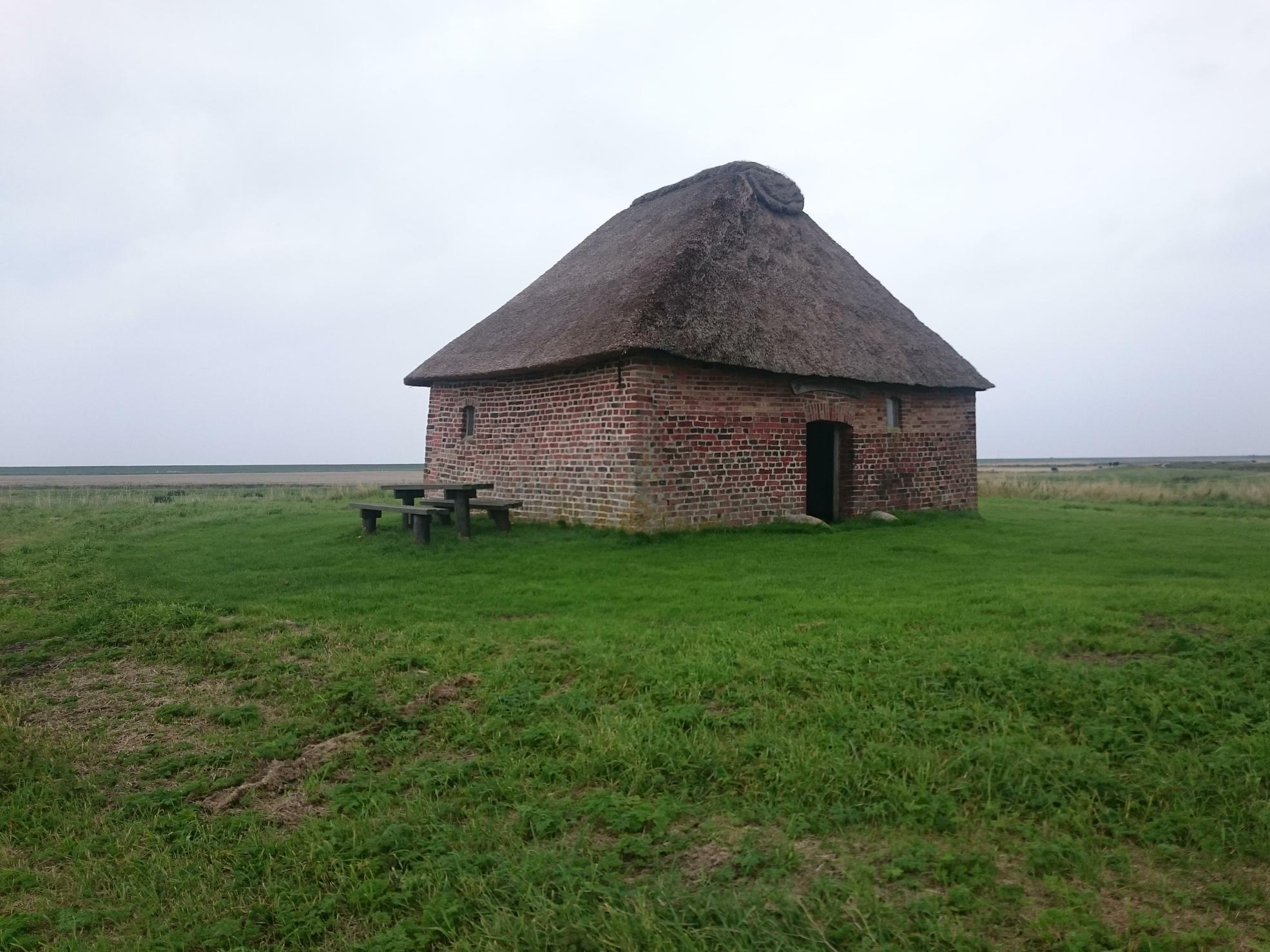 Markmandshuset, Ballum